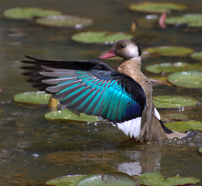 Amazonetta brasiliensis location: Jardim Botânico de São Paulo (from flickr gallery title)